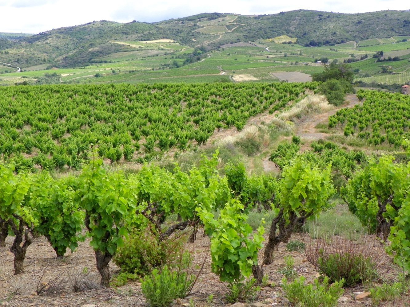 Vignoble à Villeneuve-les-Corbières